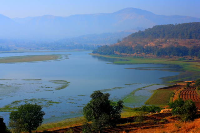 Pune, India